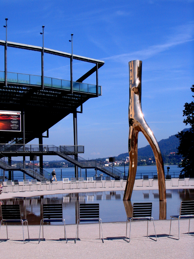 Festspiel- und Kongresshaus Bregenz Kompletter Umbau 2005 - 2006 Architekten: H. Dietrich und M. Untertrifaller (Bregenz - Wien - St. Gallen) Skulptur »Ready Maid« aus Bronze für den Symphonikerplatz von Gottfried Bechtold Lichtinstallation aus weißem Neonlicht »299,792,458 m/s«, auf dem Dach des Festspielhauses von Cerith Wyn Evans Bregenzer Festspiele: Während der Bregenzer Festspiele werden am Bodenseeufer im Sommer auf einer fest verankerten Bühne Opern, Musicals und Operetten aufgeführt. Die Bregenzer Seebühne ist mit ca. 7.000 Sitzplätzen die größte Freilicht-Festspielbühne der Welt. Jedes Jahr lockt die Oper Musikliebhaber aus der ganzen Welt nach Bregenz. In den Jahren 2007 und 2008 wird - neben anderen Produktionen - Tosca von Giacomo Puccini auf der Seebühne aufgeführt.